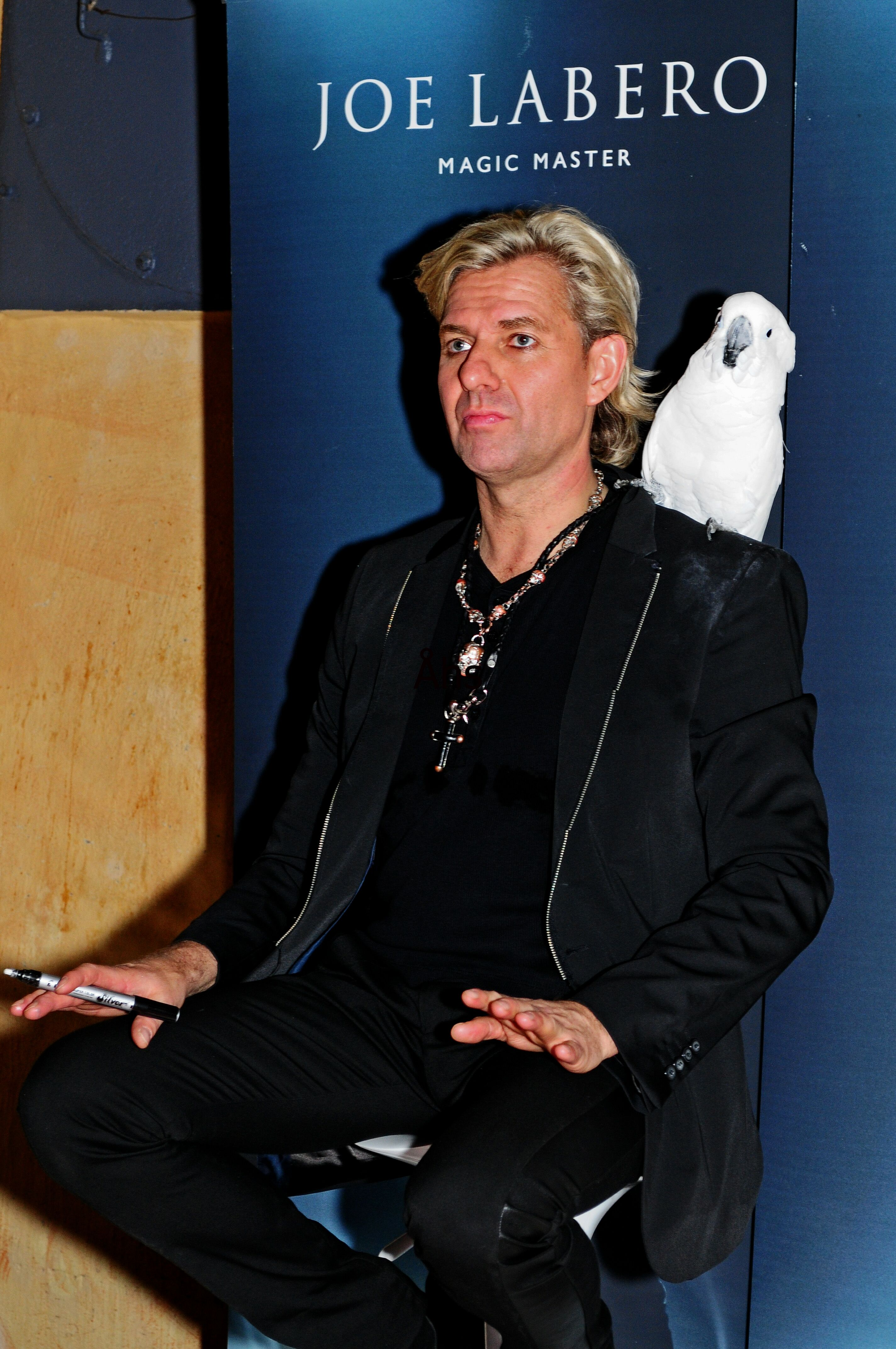 Labero besöker Norrköping med Turnen "20år Senare"